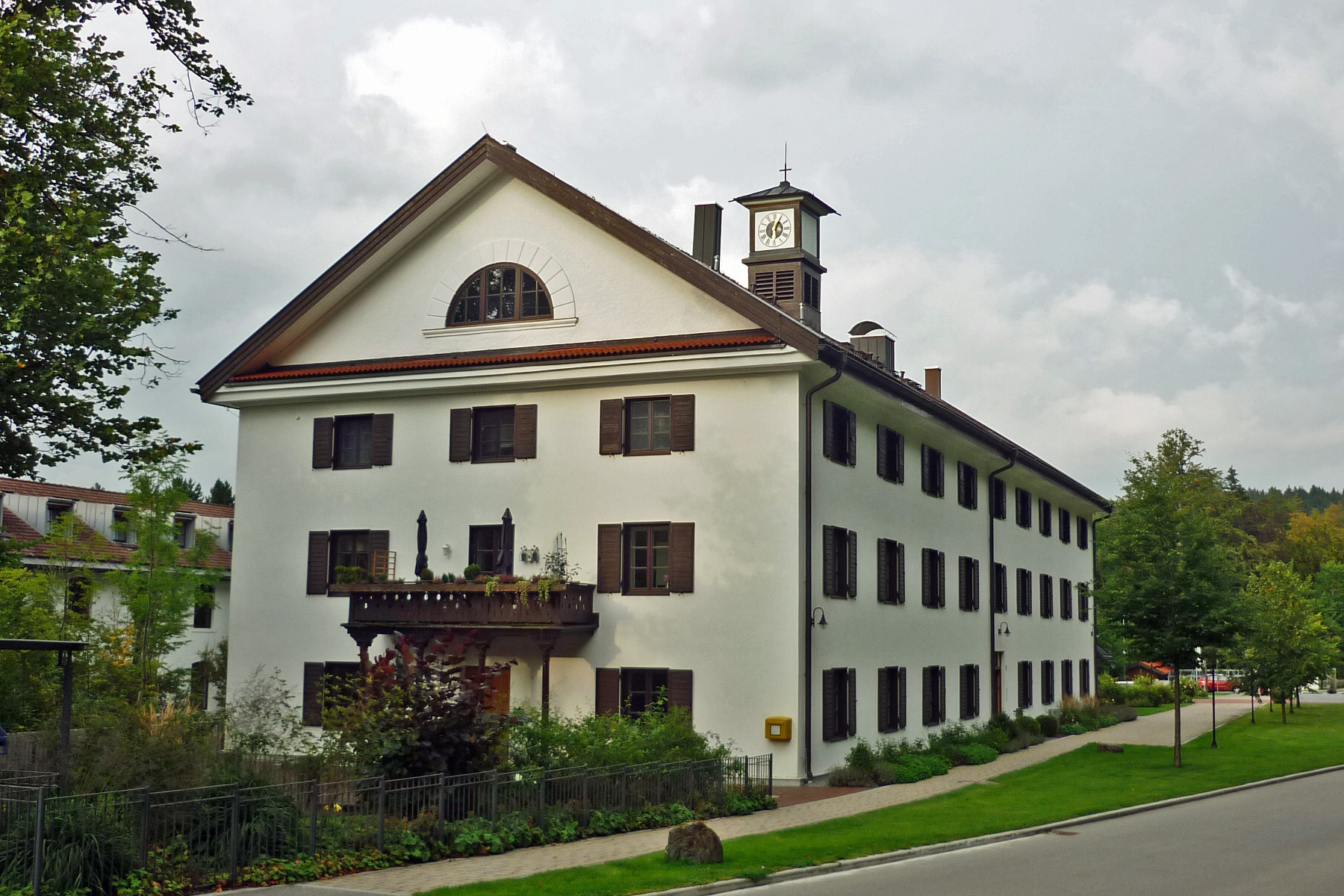 Ehem. Hauptgebäude der Papierfabrik Louisenthal bei Gmund am TegernseeThis is a photograph of an architectural monument.